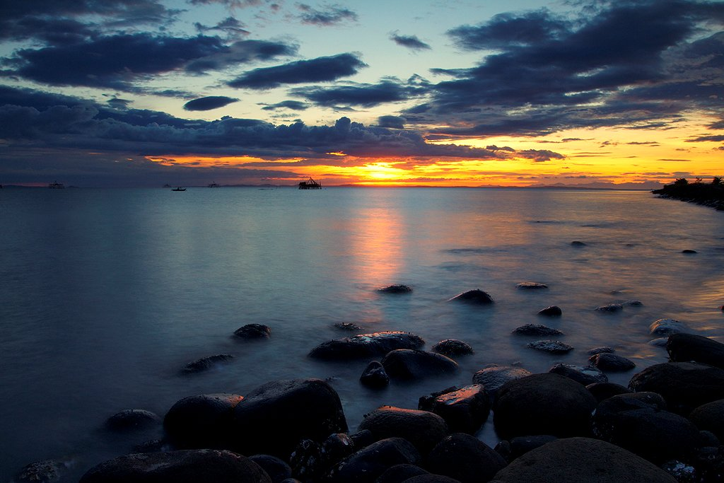 Bacolod, Western Visayas, Philippines